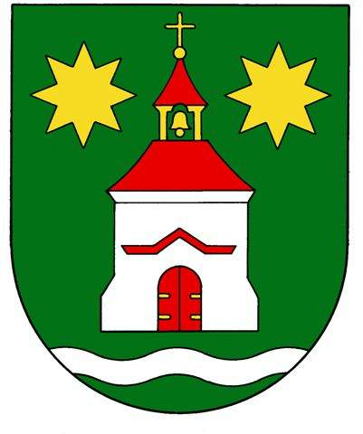 Česky: znak obce Radětice